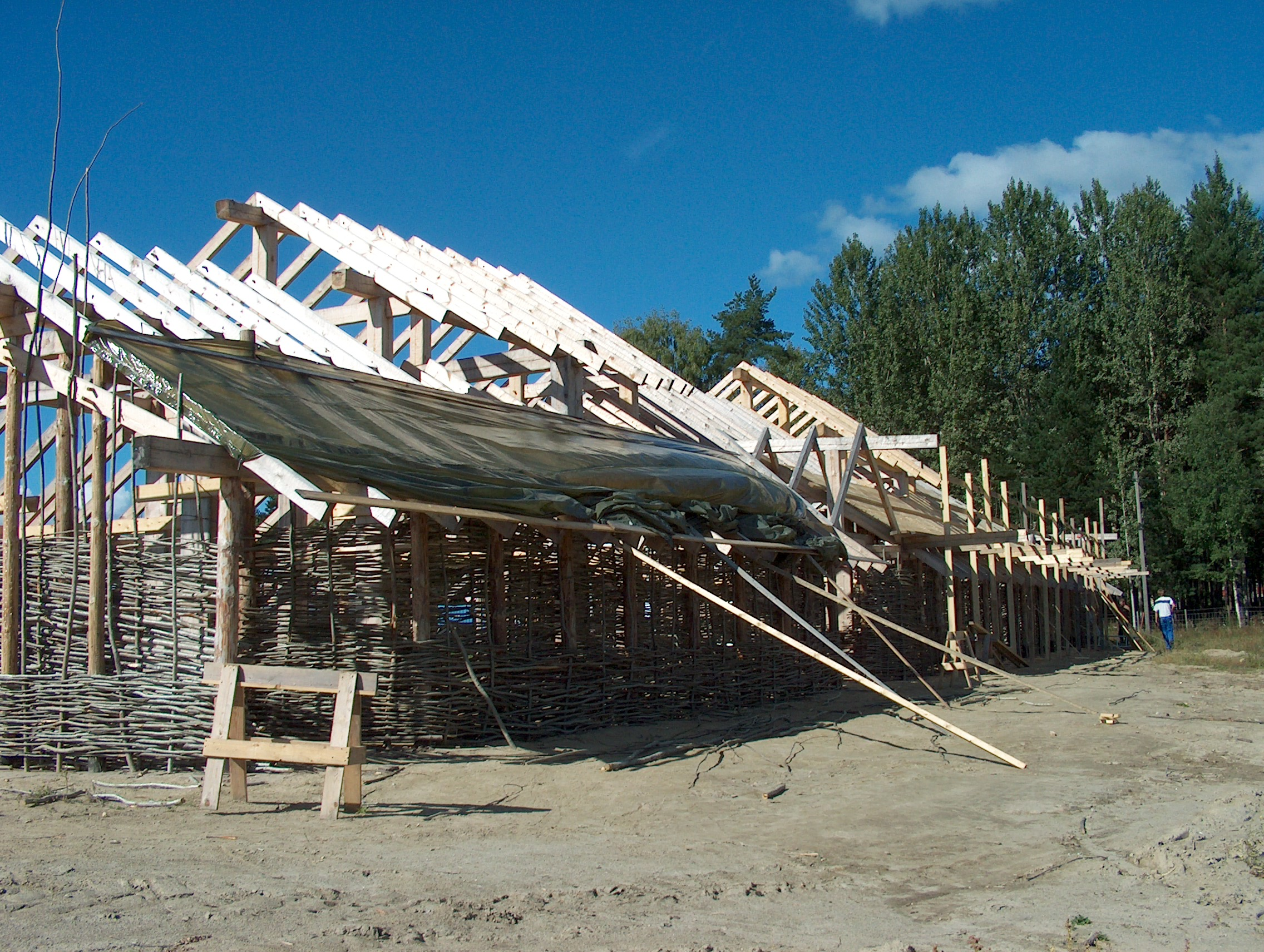 Fra konstruksjonen av langhuset på Veien (Veien Kulturminnepark)